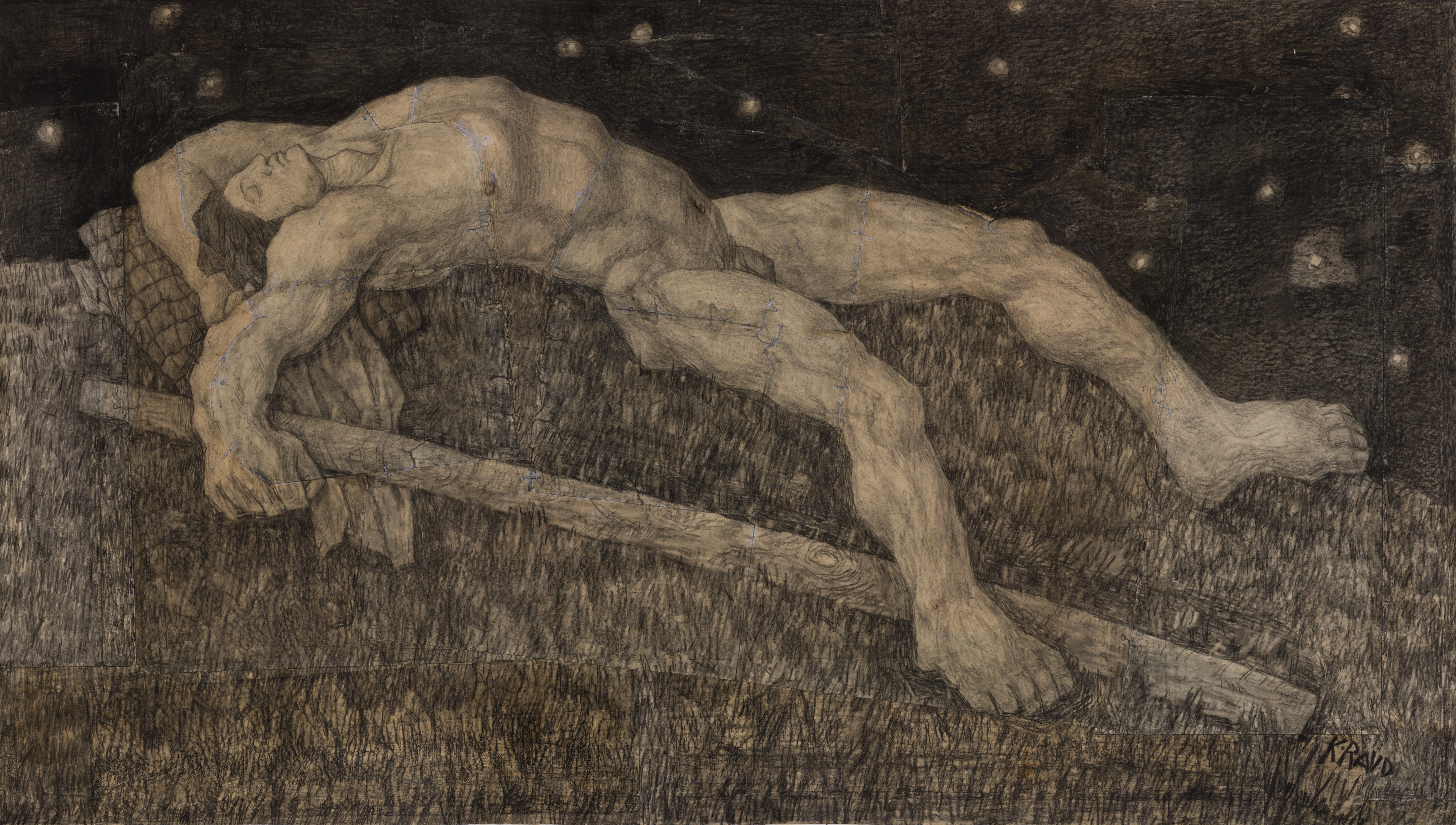 Kristjan Raua joonistus "Magav Kalevipoeg" (1933). Süsi paberil. Lehe kõrgus 47,5 cm ja laius 83,5 cm. MUIS: TKM TR 401:1 B 123